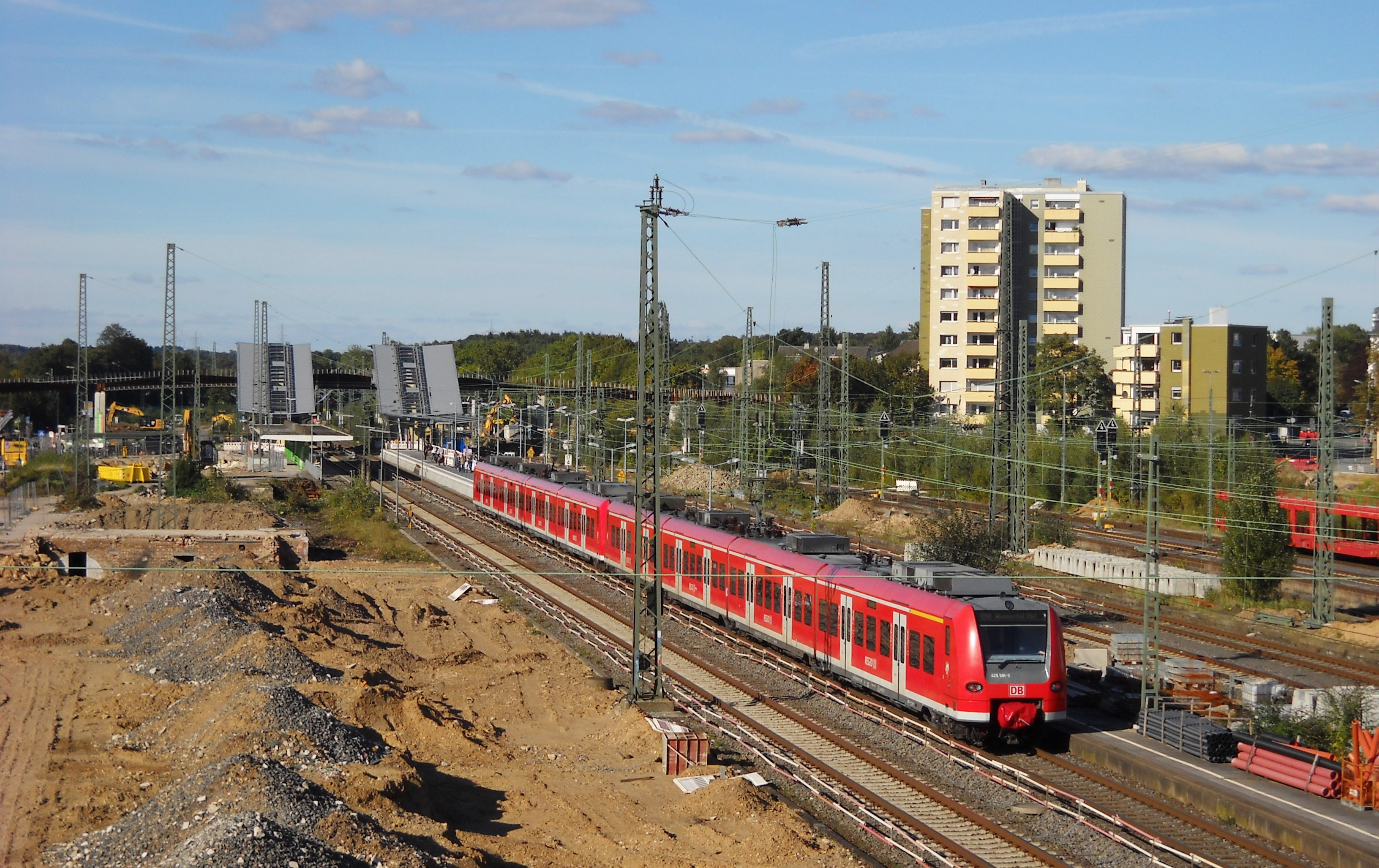 DB-Triebwagen 425 091 fährt als RB 48 in den gerade im Umbau befindlichen Bahnhof Opladen ein